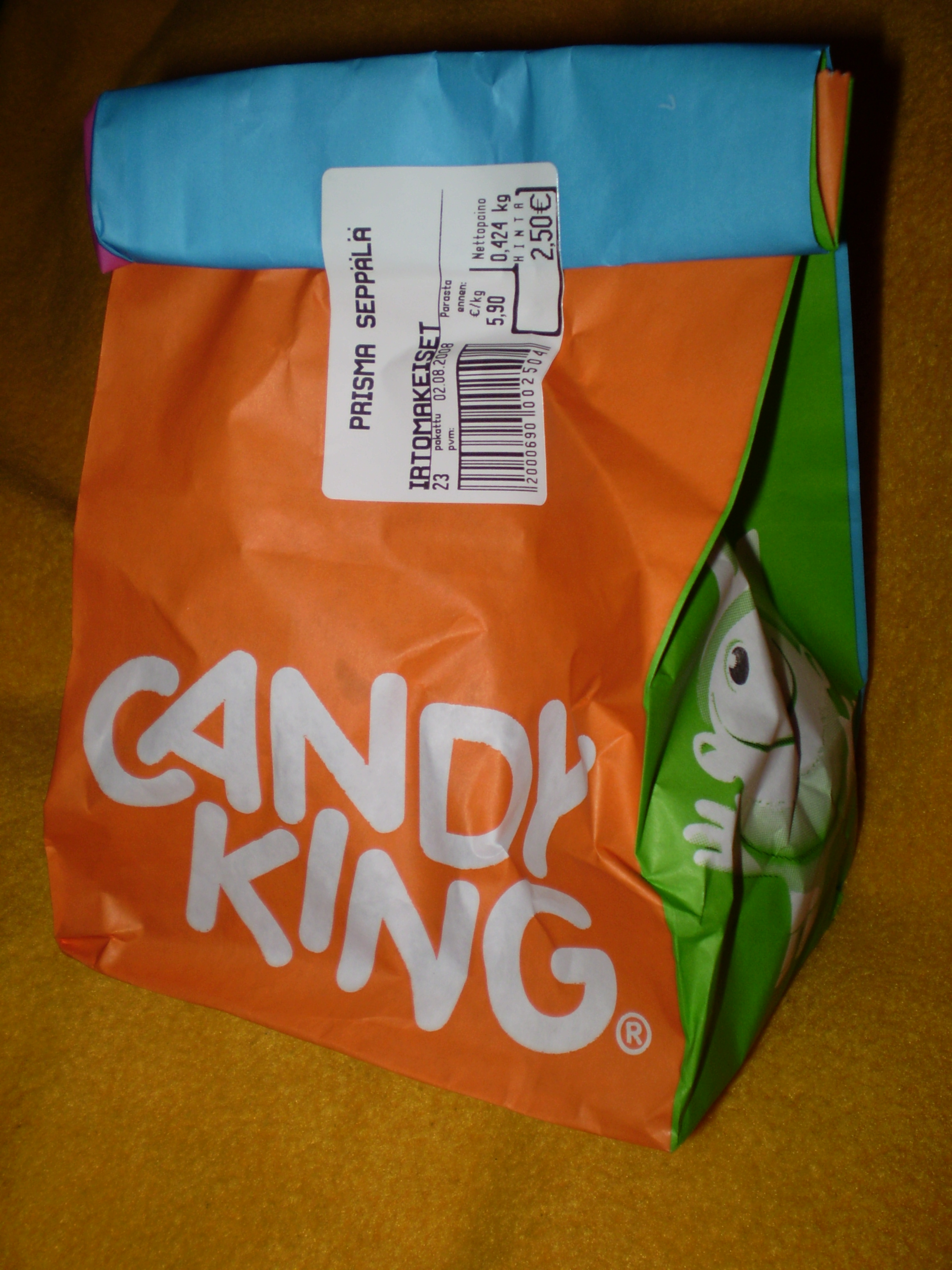 Candy bag